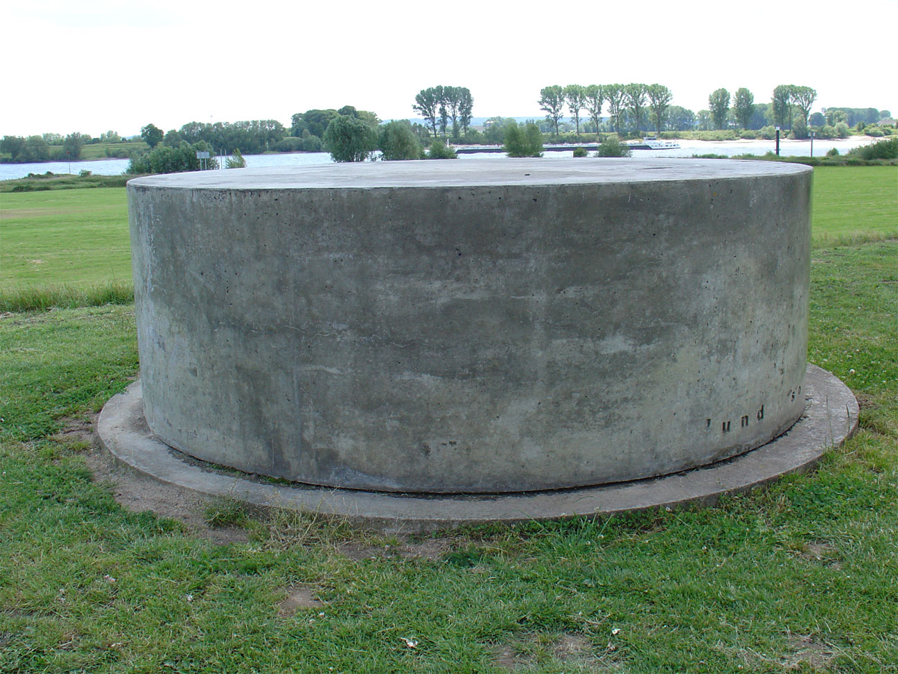 Und so weiter aan de Duits-Nederlandse grens- de plaats waar de Rijn Nederland binnenkomt, één kilometer ten oosten van Spijk